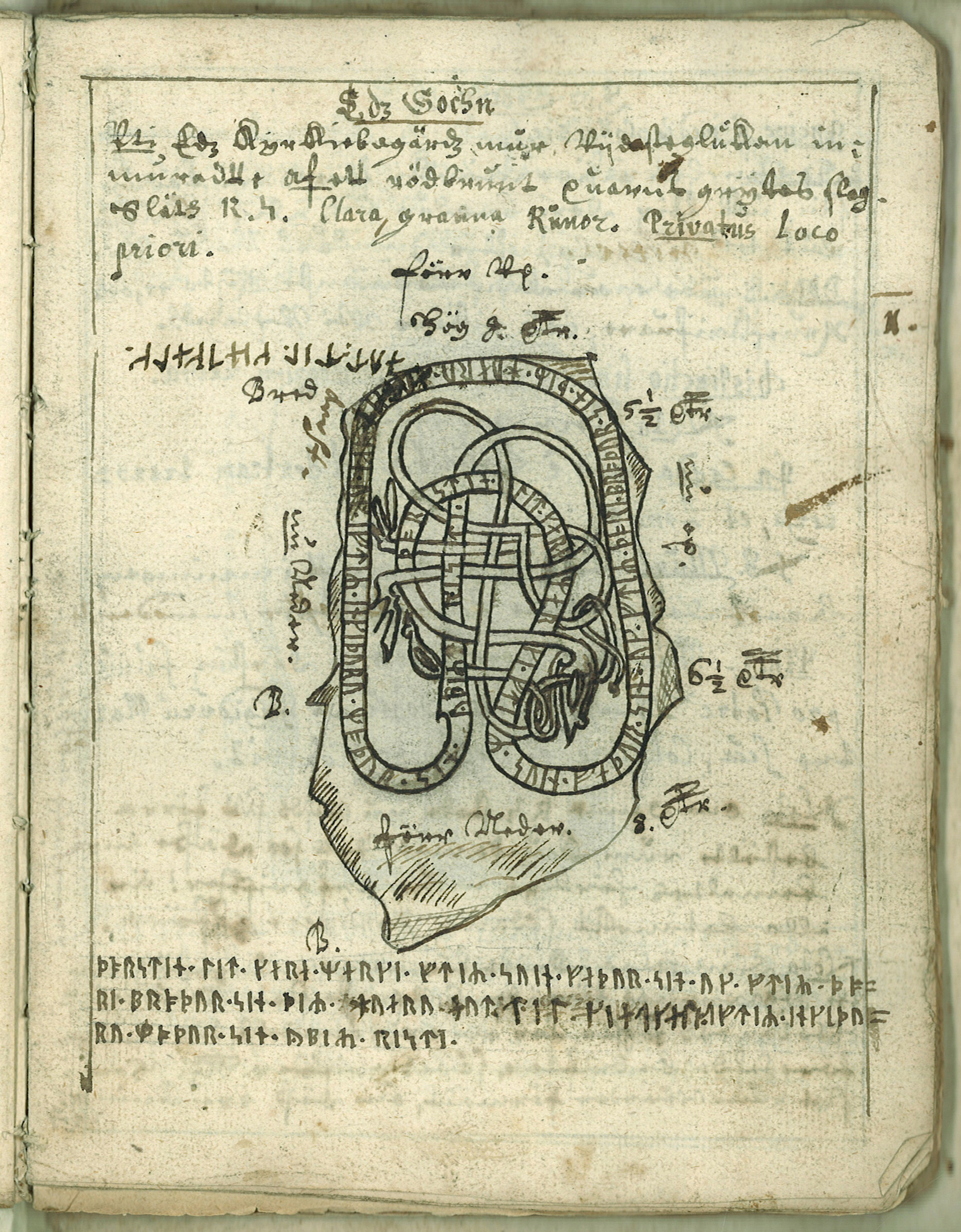 Runsten (U 104), som under 1600-talet satt inmurad i Eds kyrkas kyrkogårdsmur. 1687 beviljade Karl XI att denna sten skulle få exporteras till Oxford, där den införlivades med universitetets samlingar. Stenen blev 1848 flyttad till Ashmolean Museum, där den står i vestibulen utanför museets bibliotek: Länk till foto taget på Ashmolean Museum. Inskrift: "Torsten lät göra minnesmärket efter Sven, sin fader, och efter Tore, sin broder - de voro ut till Grekland - och efter Ingetora, sin moder. Öpir ristade." En annan avbildning av Aschaneus finns återgiven i Sveriges runinskrifter. Bd 6, Upplands runinskrifter, D. 1, 1940-1943. Källa: Stifts- och landsbiblioteket i Skara: MS Språkvetenskap 15, 3r